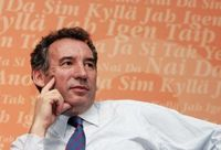 François bayrou député europeen